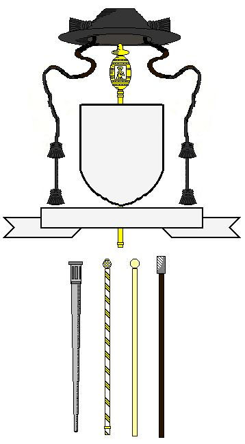 Wapen van een kanunnik met gepaalde priorstaf en vier historische prior- of cantorstaven. Eigen tekening. Het historische voorbeeld is het wapen van Antonius Jeanjean.